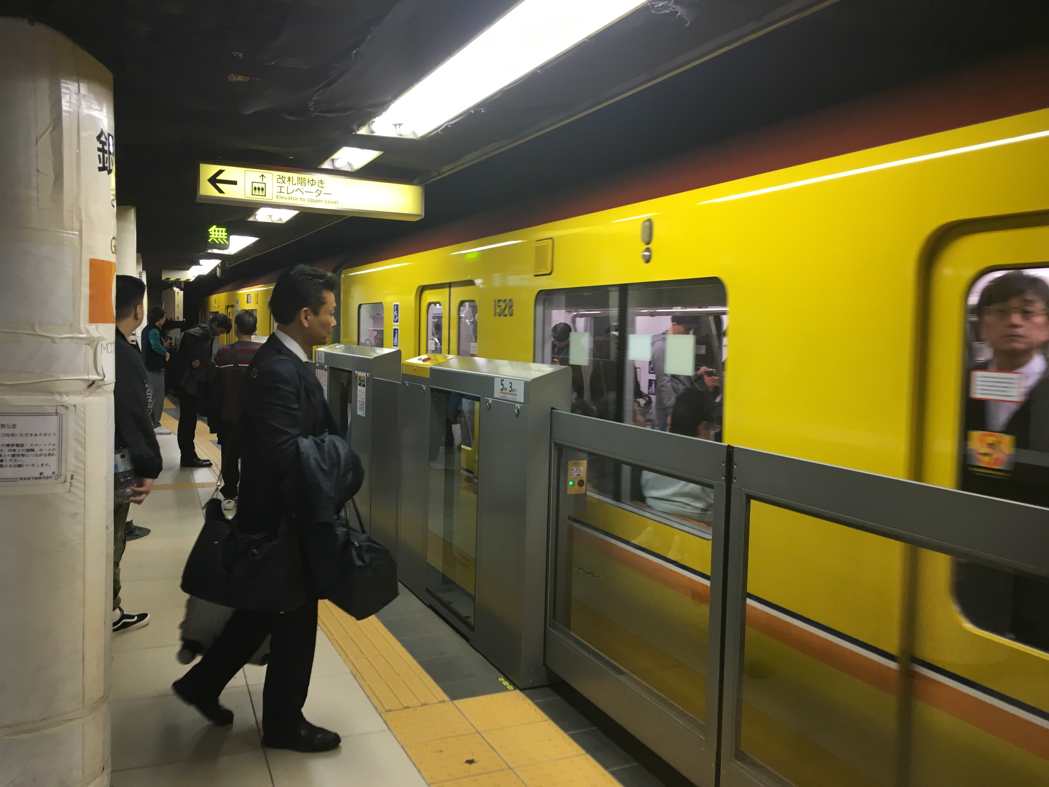 銀座線、銀座駅のホーム (Ginza line, Ginza station)